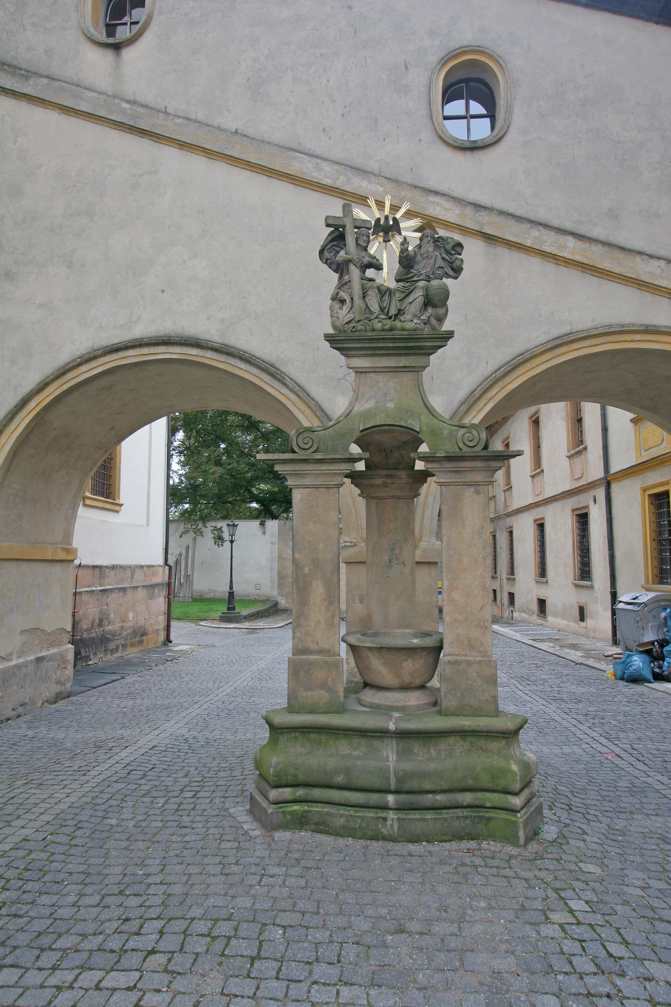 sousoší Nejsvětější Trojice, Valdštejnovo nám., Jičín